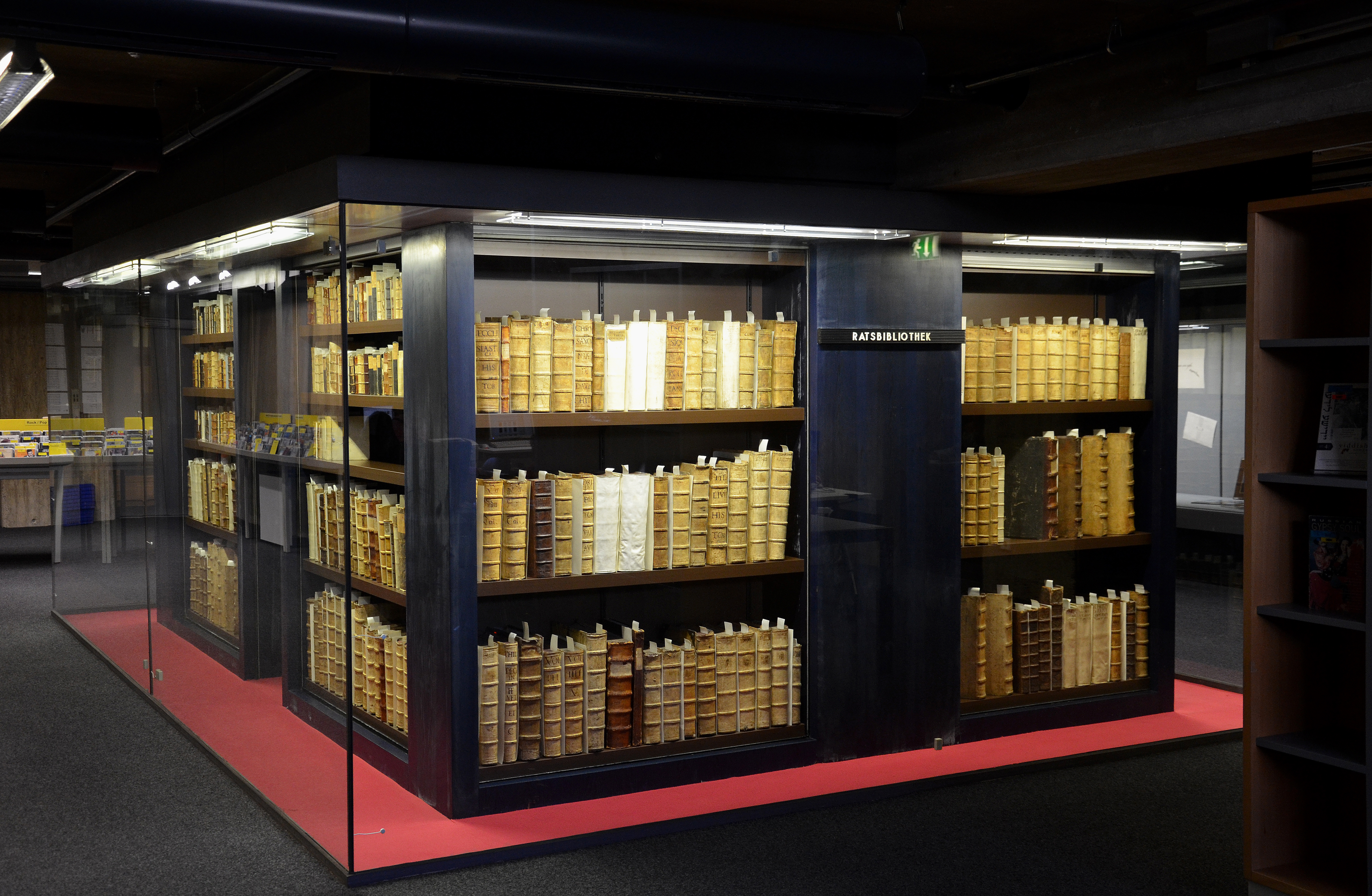 Die Ratsbibliothek der Stadt Hannover hat ihren Ursprung in einer Schenkung im Jahr 1440 durch Konrad von Sarstedt an den Rat der Stadt Hannover. Die durch weitere Schenkungen, Zustiftungen und durch Übernahme aus Nachlässen bis in 19. Jahrhundert angewachsene Sammlung, darunter auch die Buchbestände von 1476 des Volkmar von Anderten mit Handschriften und Inkunabeln. Die wertvollen Bücher finden sich heute (Stand: 07/2015) großteils in einem klimatisierten und durch Glaswände eigens gesicherten Raum im Untergeschoss der Stadtbibliothek ...